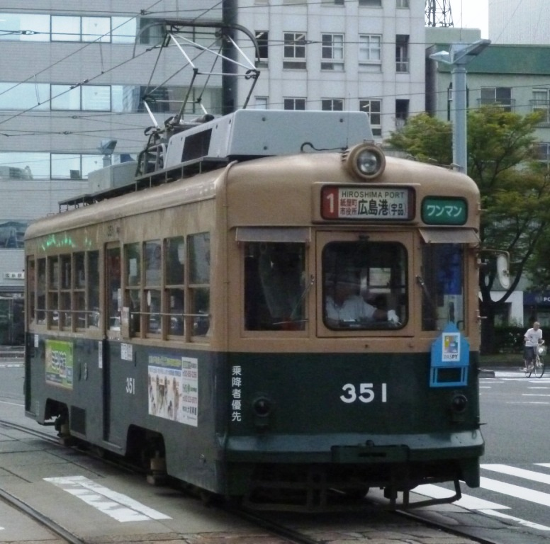 広電351号